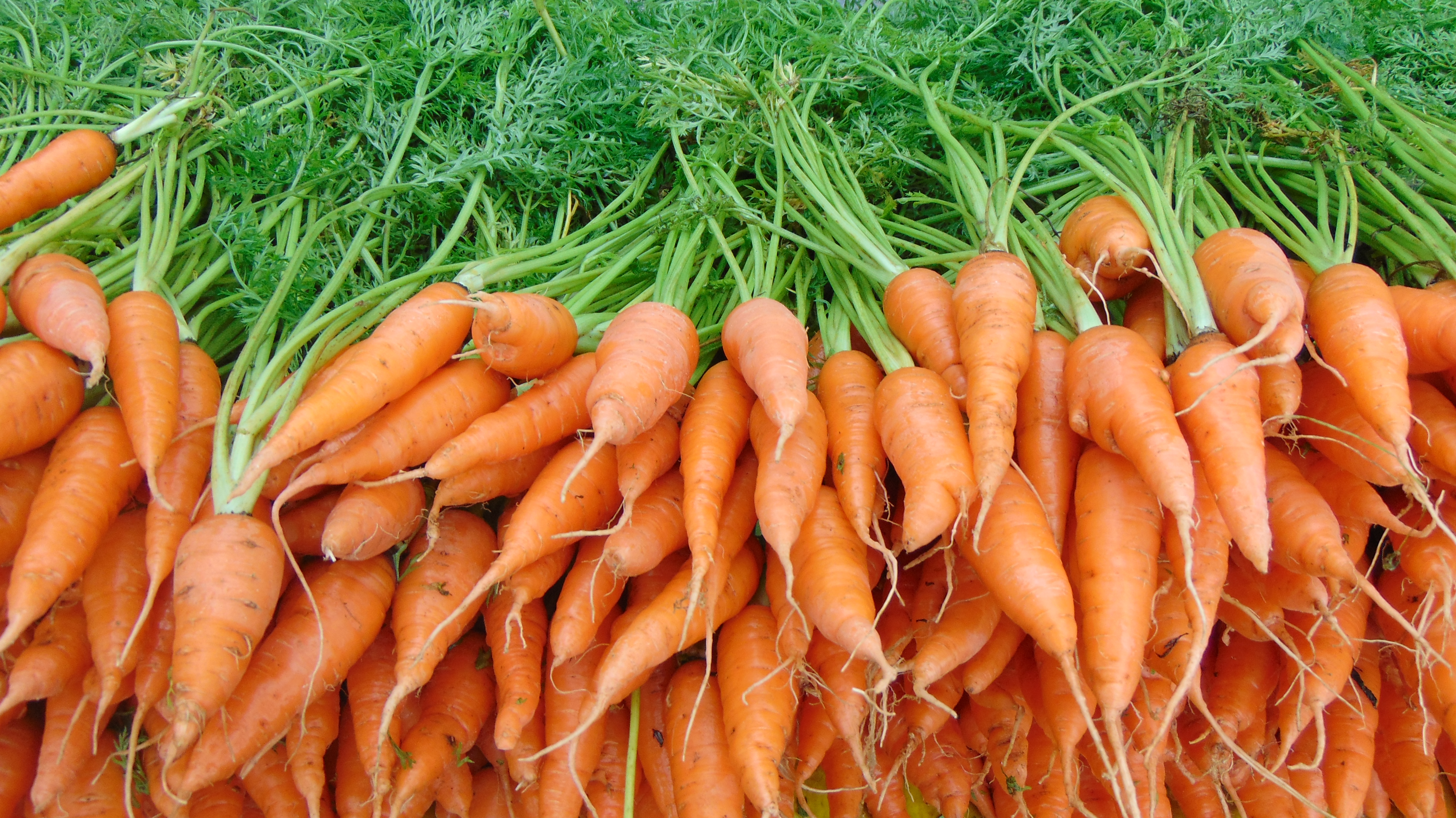 செம்மங்கி அல்லது மஞ்சள் முள்ளங்கி